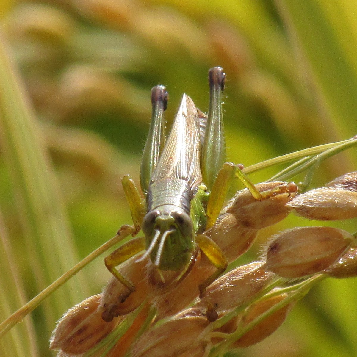 １メートル先の稲穂に乗ったイナゴを正面から光学１６倍ズームで撮影。最大解像度の画像から1200pix四方にトリミングで切り抜き。